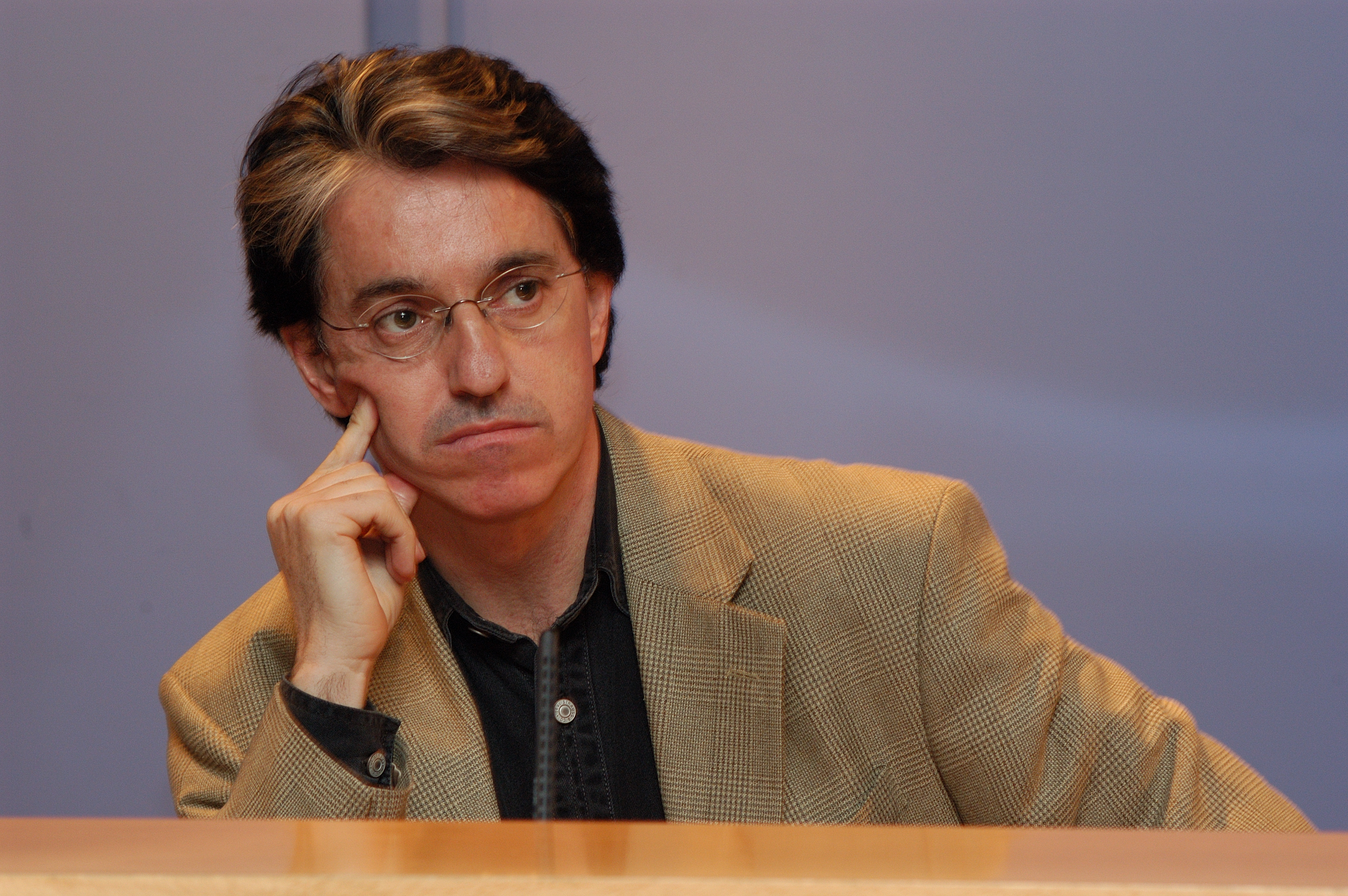 Julian Casanovas al MHC el 2004.